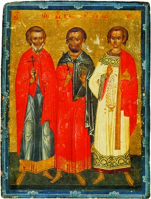 Мученики Гурий, Самон и Авив. Икона-таблетка. Тверь. 3-я четв. XV в. (СПГИАХМЗ)